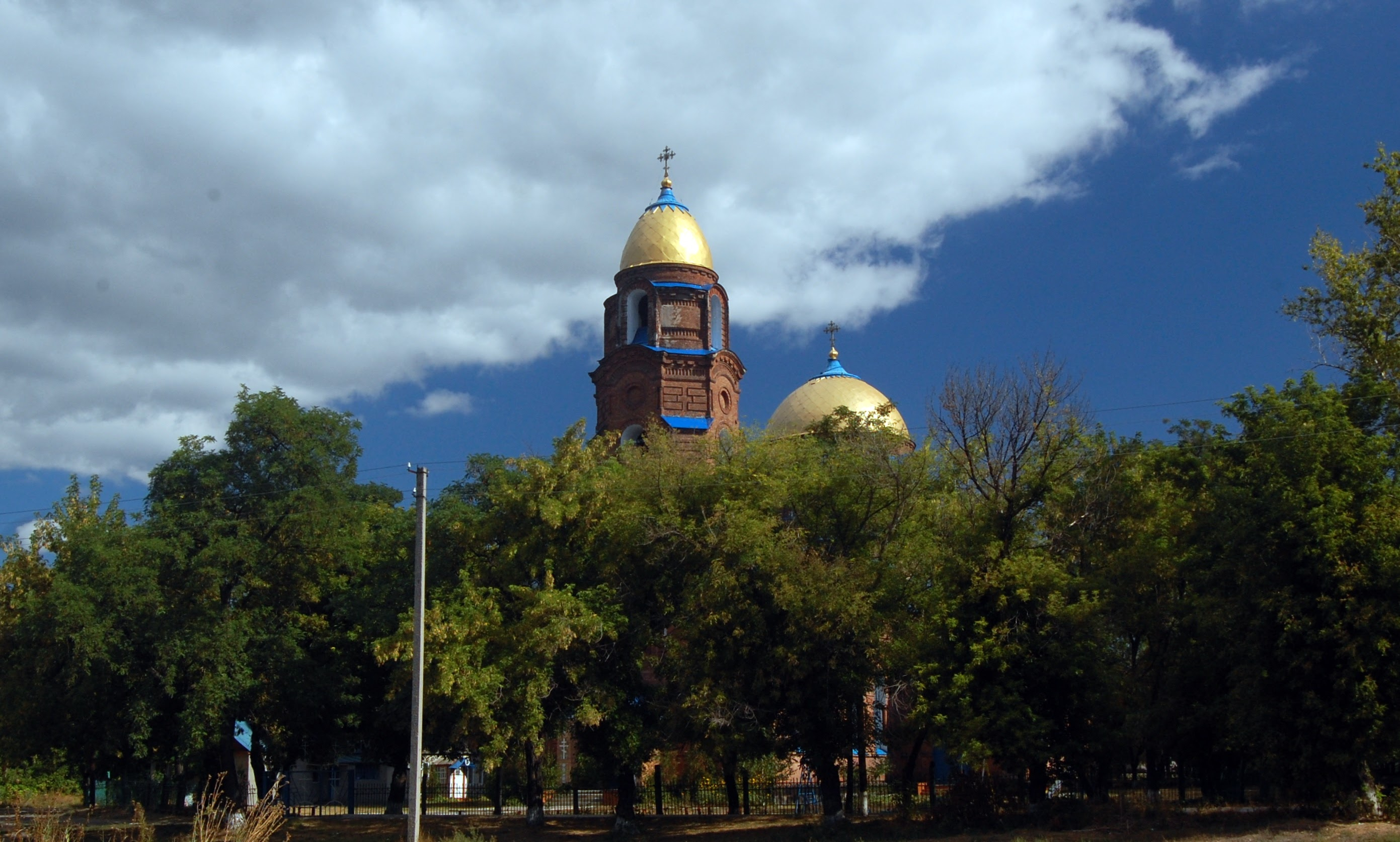 Церква Покрова І Святої Богородиці у Трьохізбенці